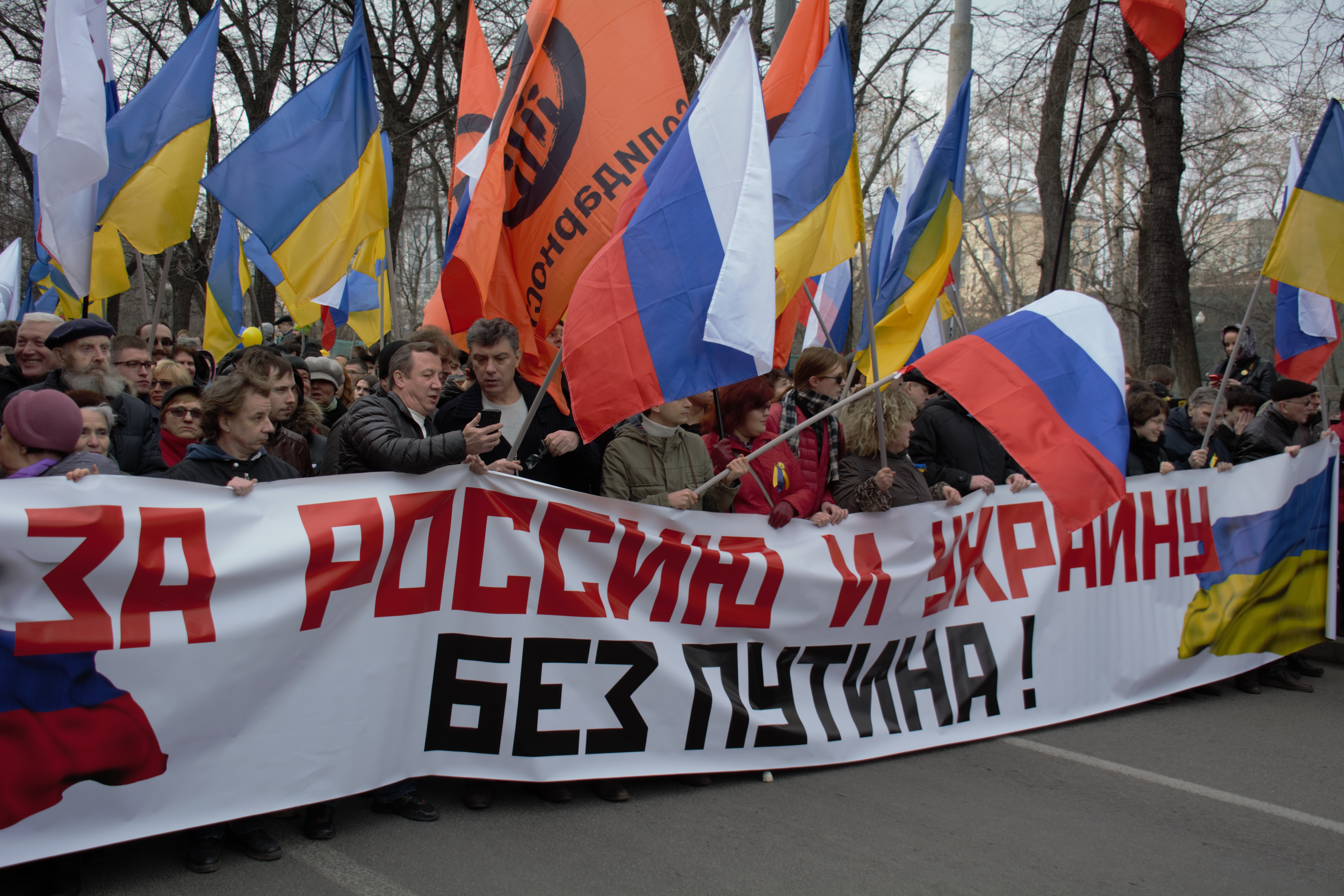 За Россию и Украину без Путина!